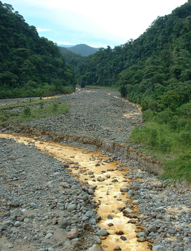 Rio Sucio, in Parque Nacional Braulio Carrillo, Vásquez de Coronado cantón, Costa Rica